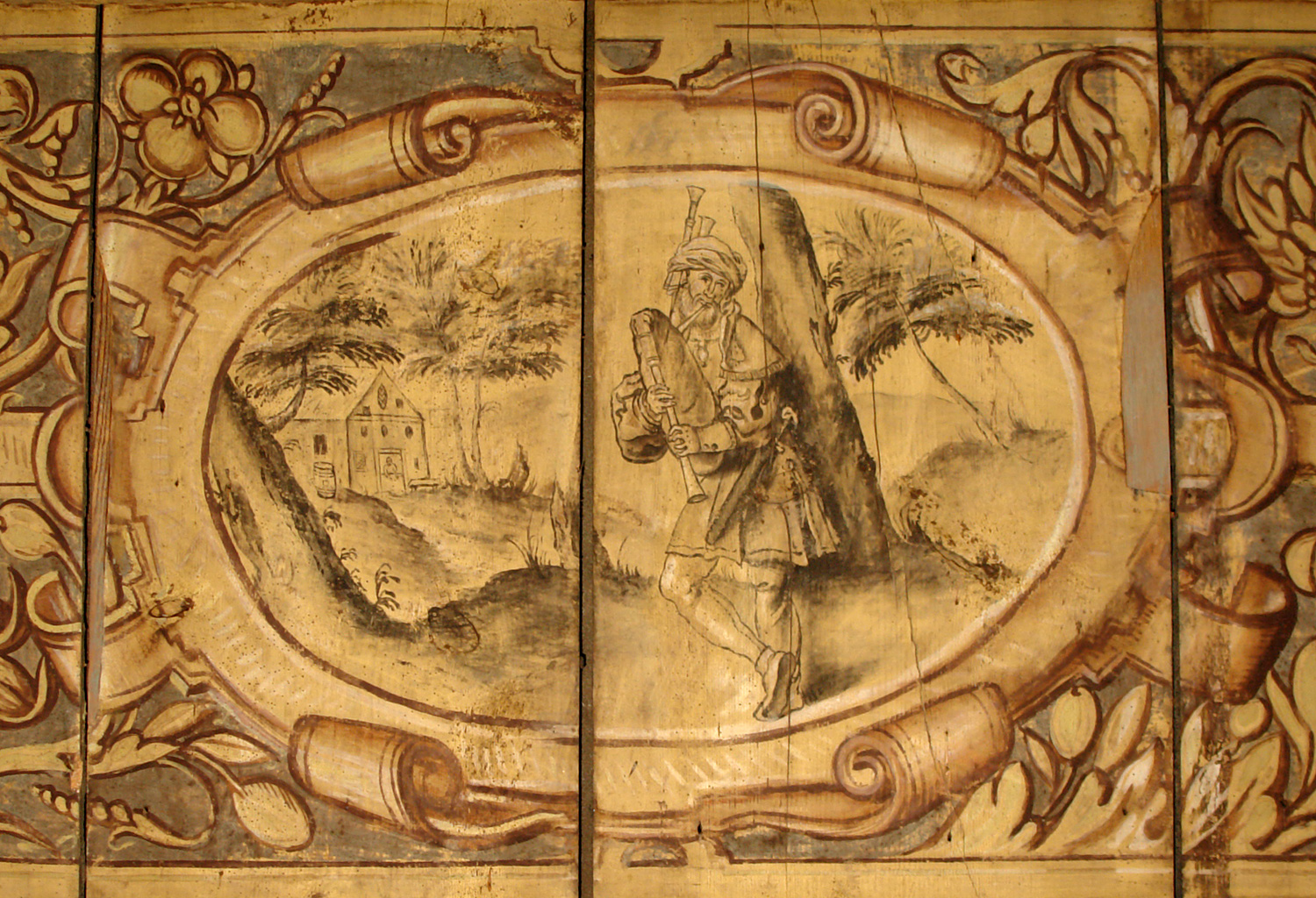 Bremen: Haus Heineken in der Sandstraße 3. Deckenmalerei von 1580, Medaillon „Tanz“ und/oder „Musik“: Dudelsackspieler